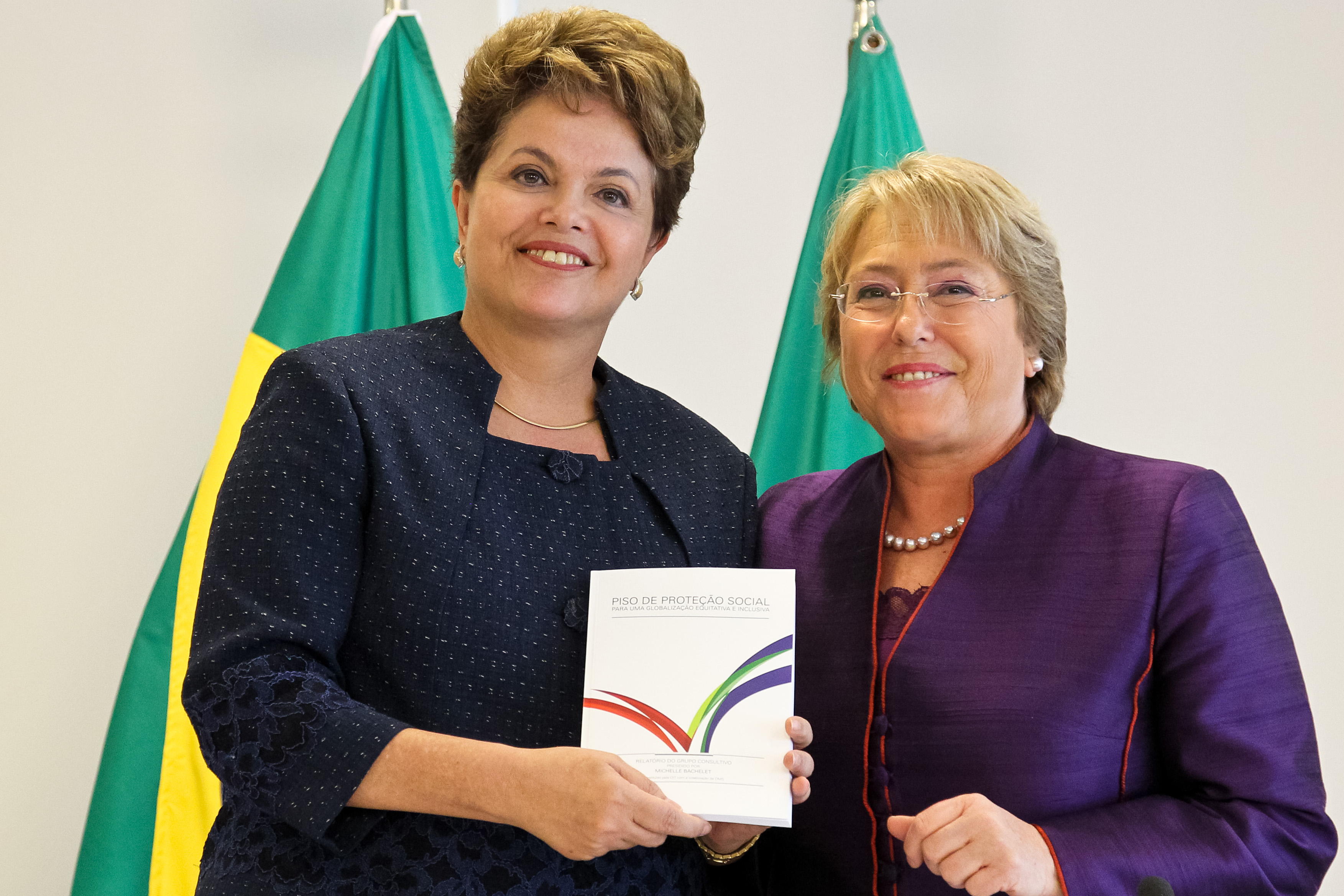 Brasília - DF, Presidenta Dilma Rousseff durante entrega oficial do Relatório de Proteção Social para uma Globalização Equitativa e Inclusiva com a Michelle Bachelet Diretora Executiva da ONU Mulheres, no Palácio do Planalto. Foto: Roberto Stuckert Filho/PR